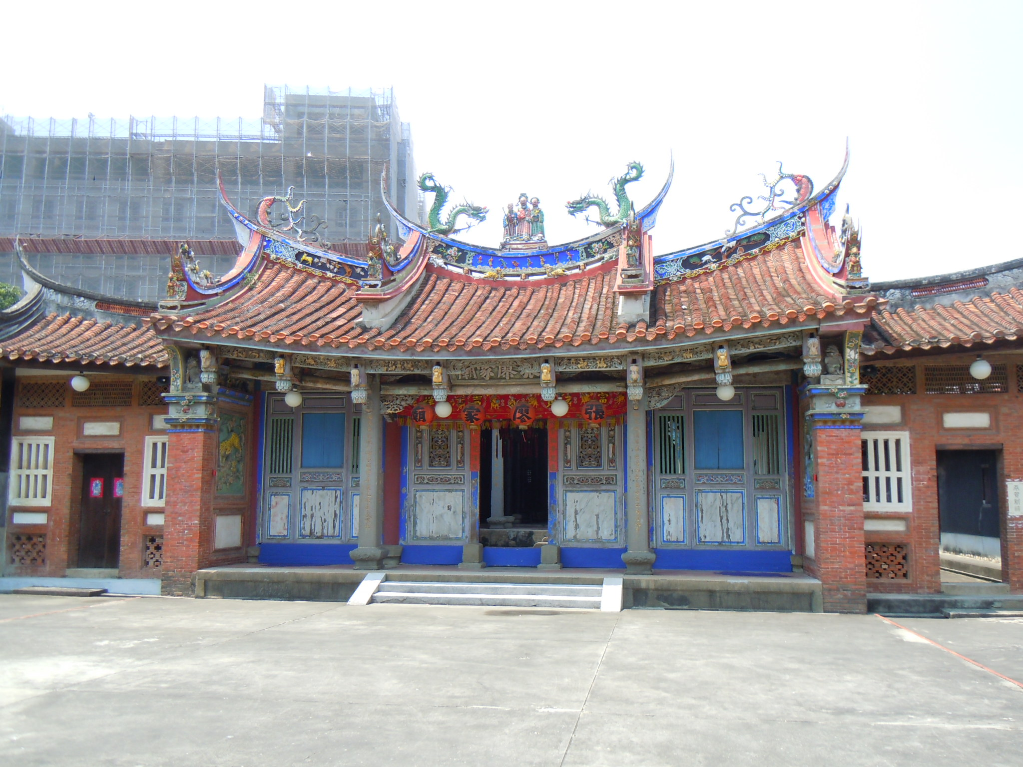 中文（台灣）: 張廖家廟位在臺中市西屯區西平里西安街205巷1號。